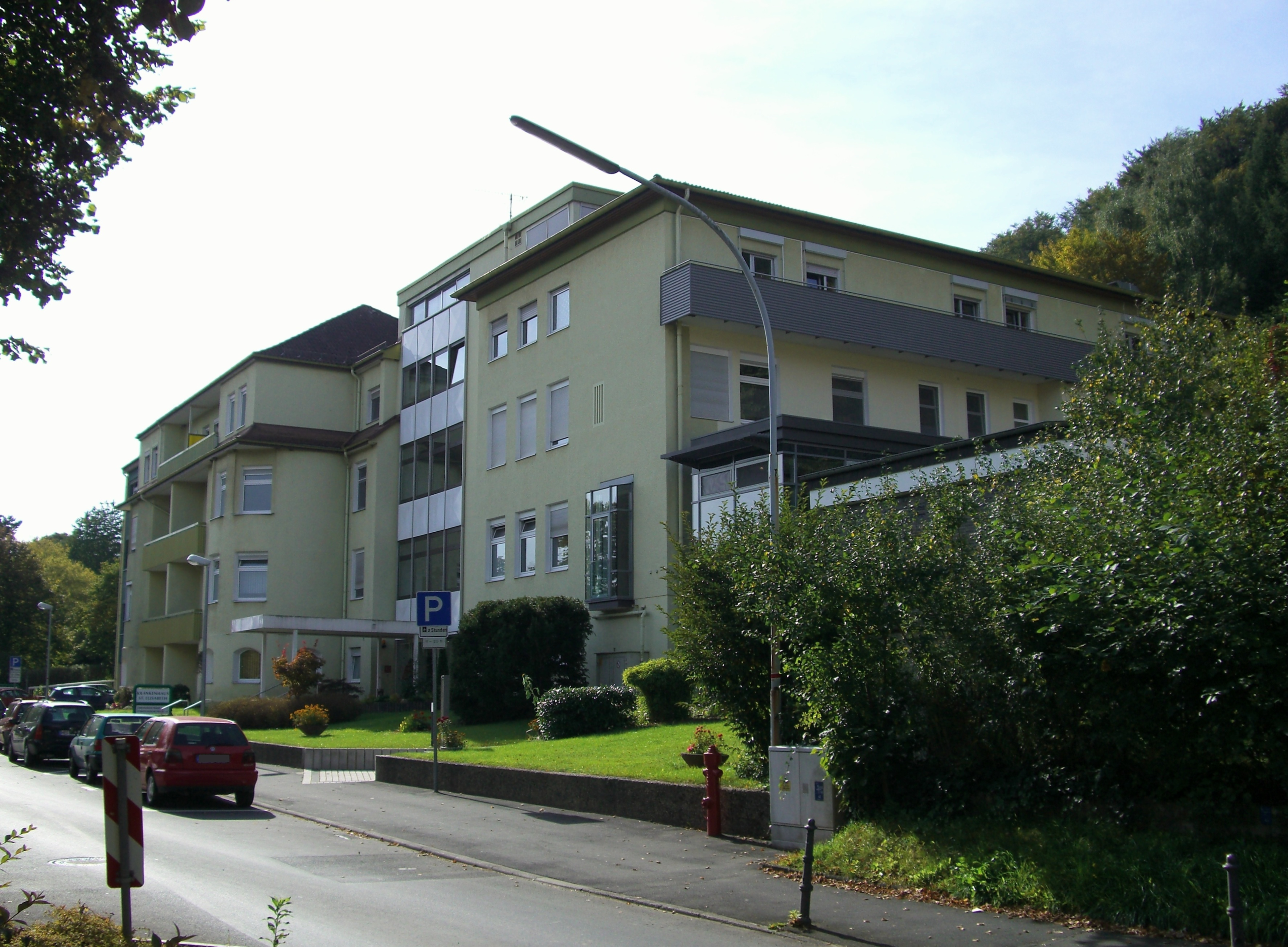 Krankenhaus St. Elisabeth Bad Hersfeld Frontansicht